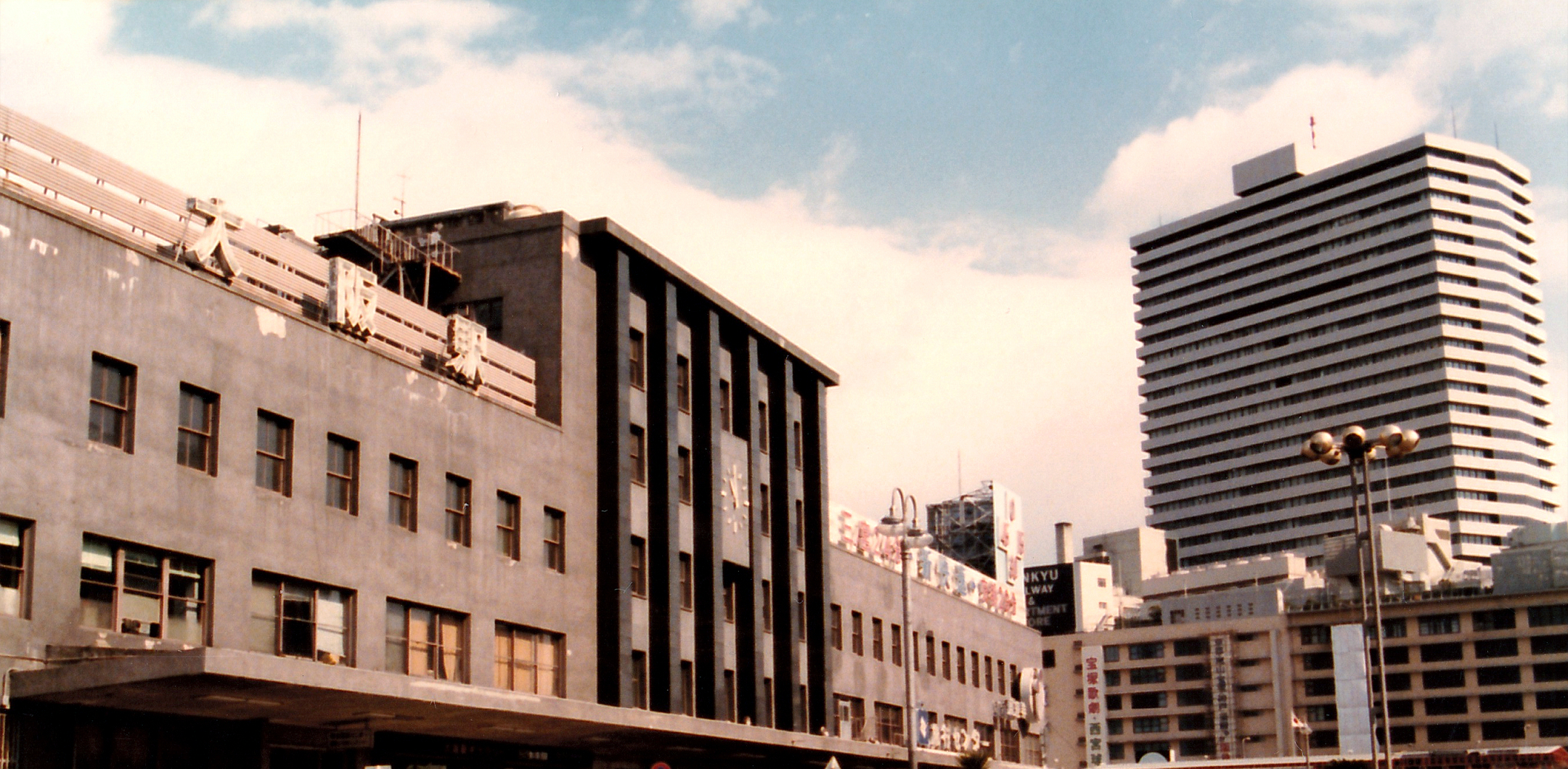 大阪駅三代目駅舎（1979年）